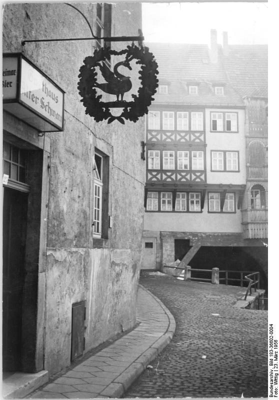 Erfurt, Krämerbrücke, Gasthaus Zentralbild Erfurt-Wittig 23.3.1956 Bn-Th. UBz: Das historische Gasthaus zum "Alten Schwan" mit Blick auf die Krämerbrücke.